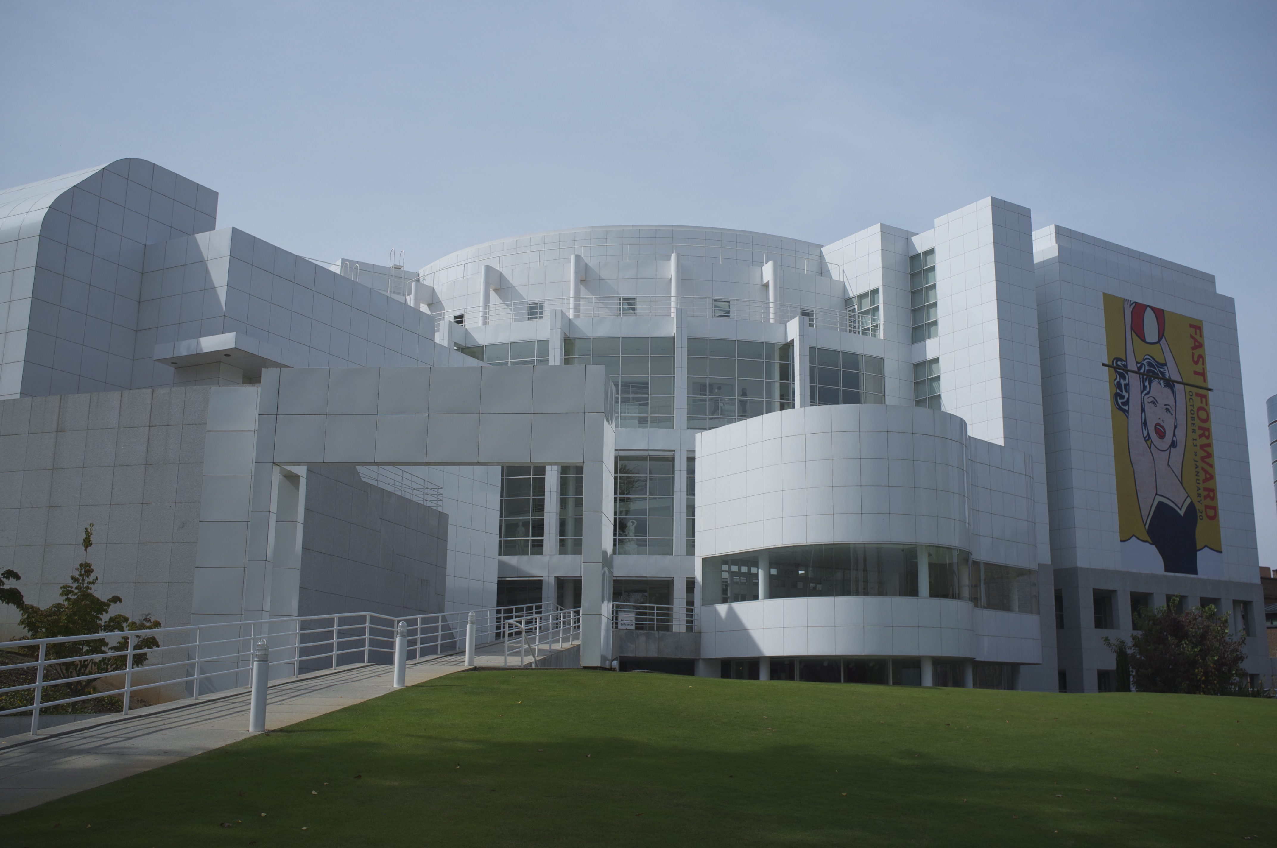 Atlanta, GA